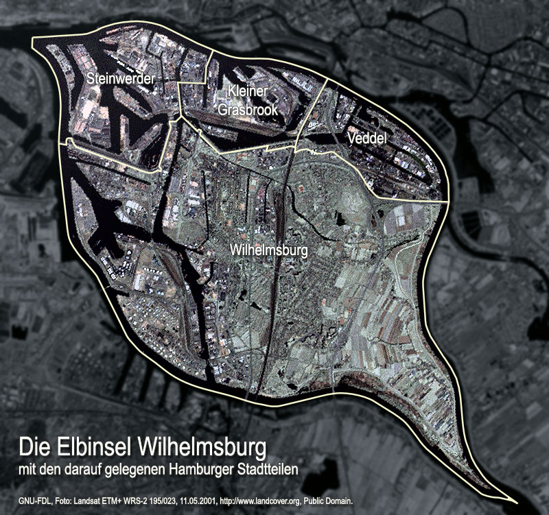 Die Elbinsel Wilhelmsburg mit den darauf gelegegen Hamburger Stadtteilen Steinwerder, Kleiner Grasbrook, Veddel und Wilhelmsburg.